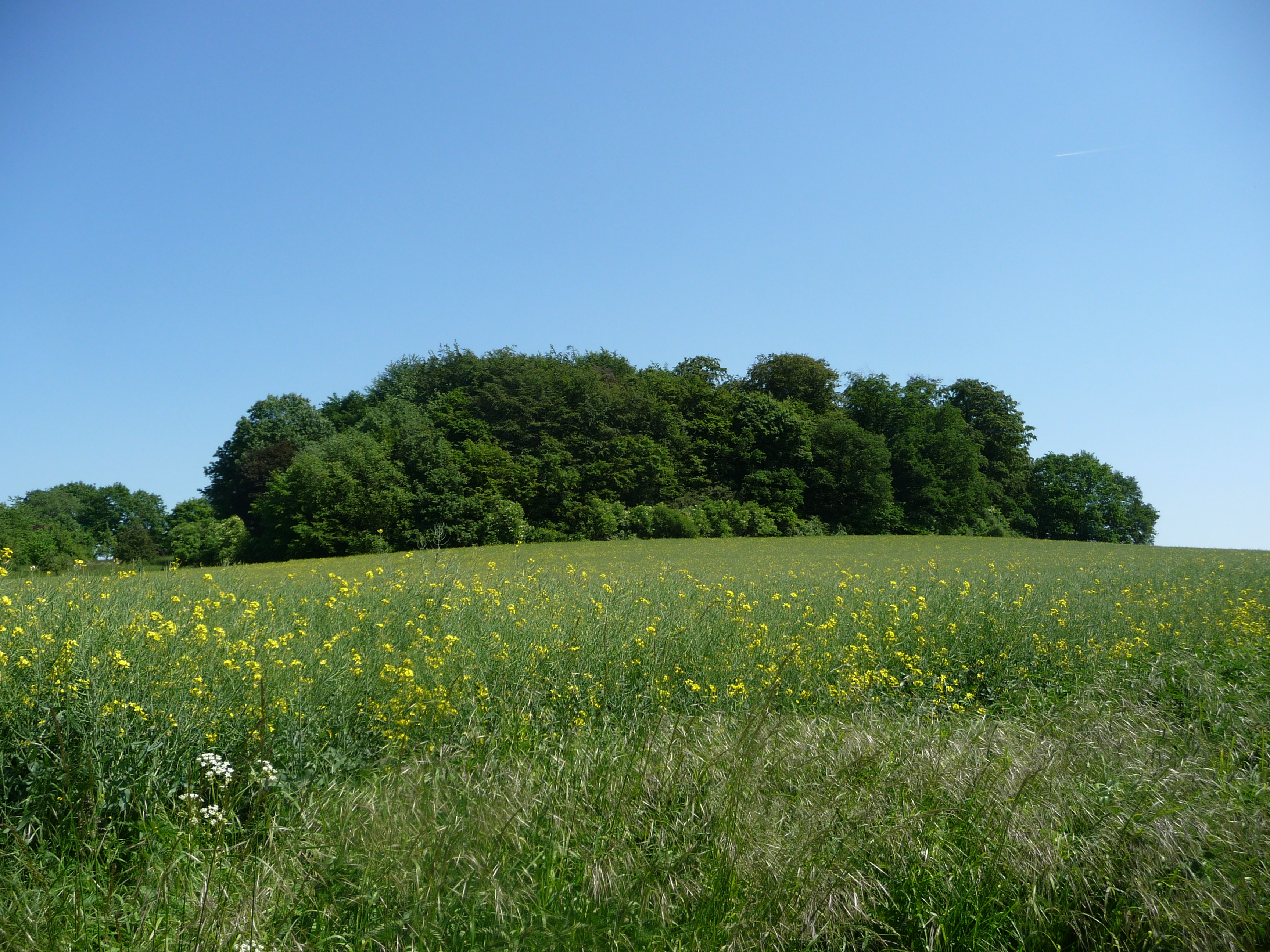 Das Loh Gesmold ist eine alte germanische Kultstätte.